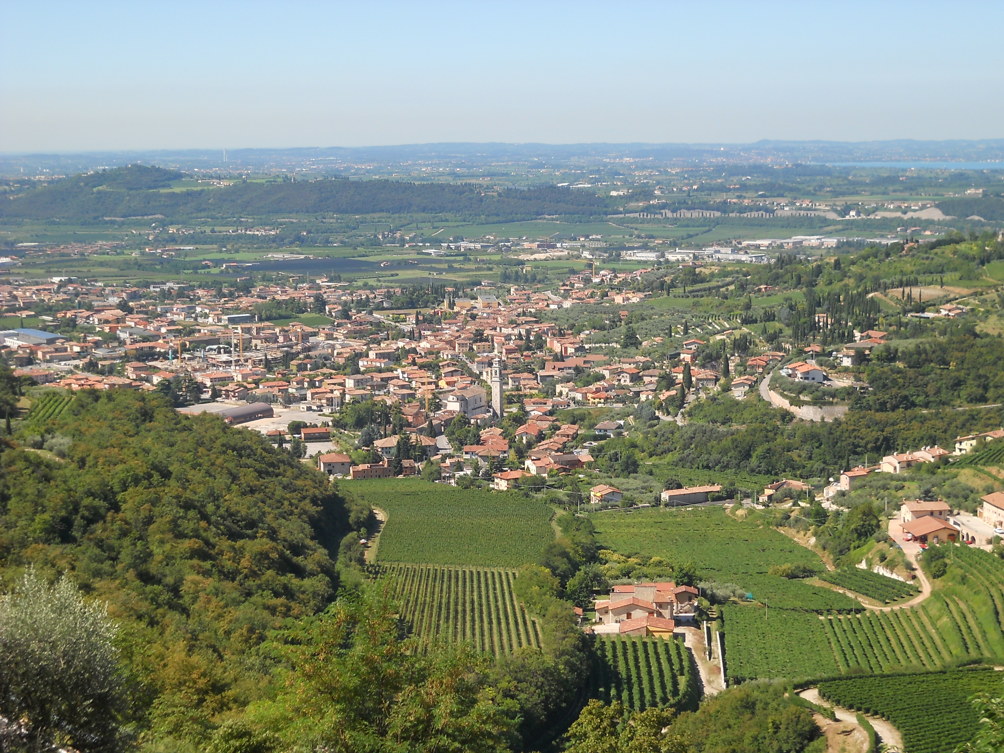 Vista di Sant'Ambrogio di Valpolicella